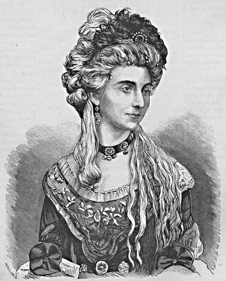 Prielle Kornélia (1826–1906) színésznő. Pollák Zsigmond metszete (Vasárnapi Ujság, 1869. június 20.)